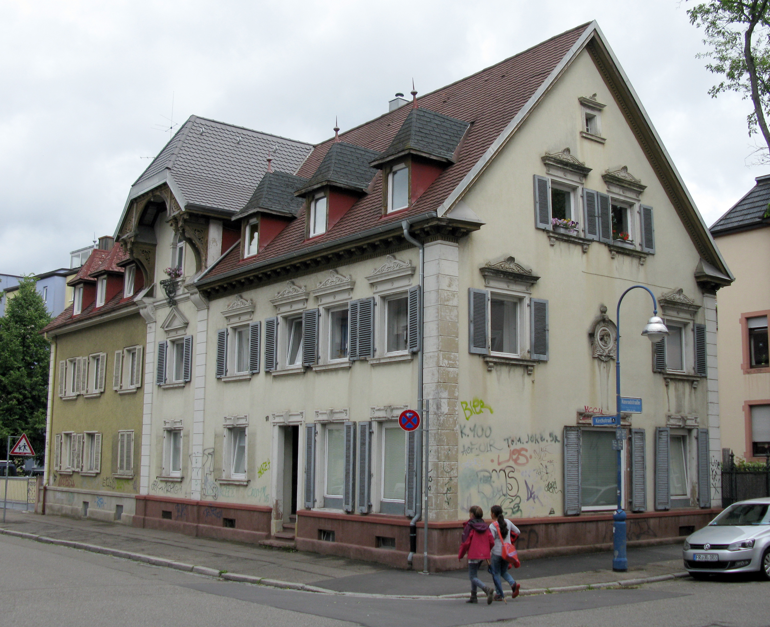 Kirchstraße 17 Ecke Konradstraße in Freiburg-Wiehre vor der Gestaltung durch Tom Brane